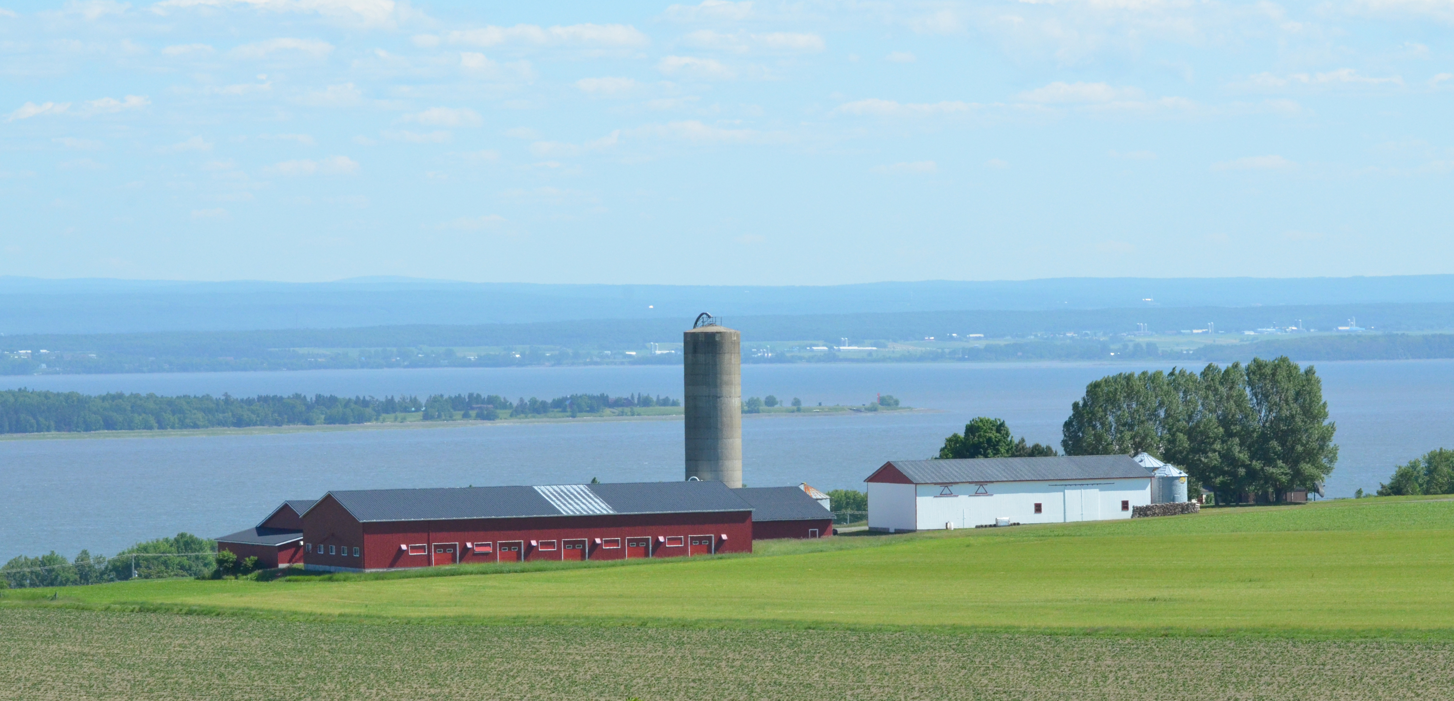 Image de la ville de Québec provenant du concours Wikipédia prend Québec.